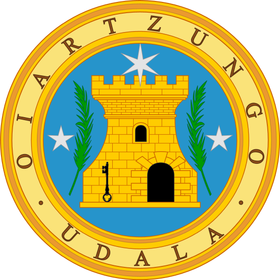 Oiartzun udalak erabiltzen duen sigilua. Orain logo moduan.